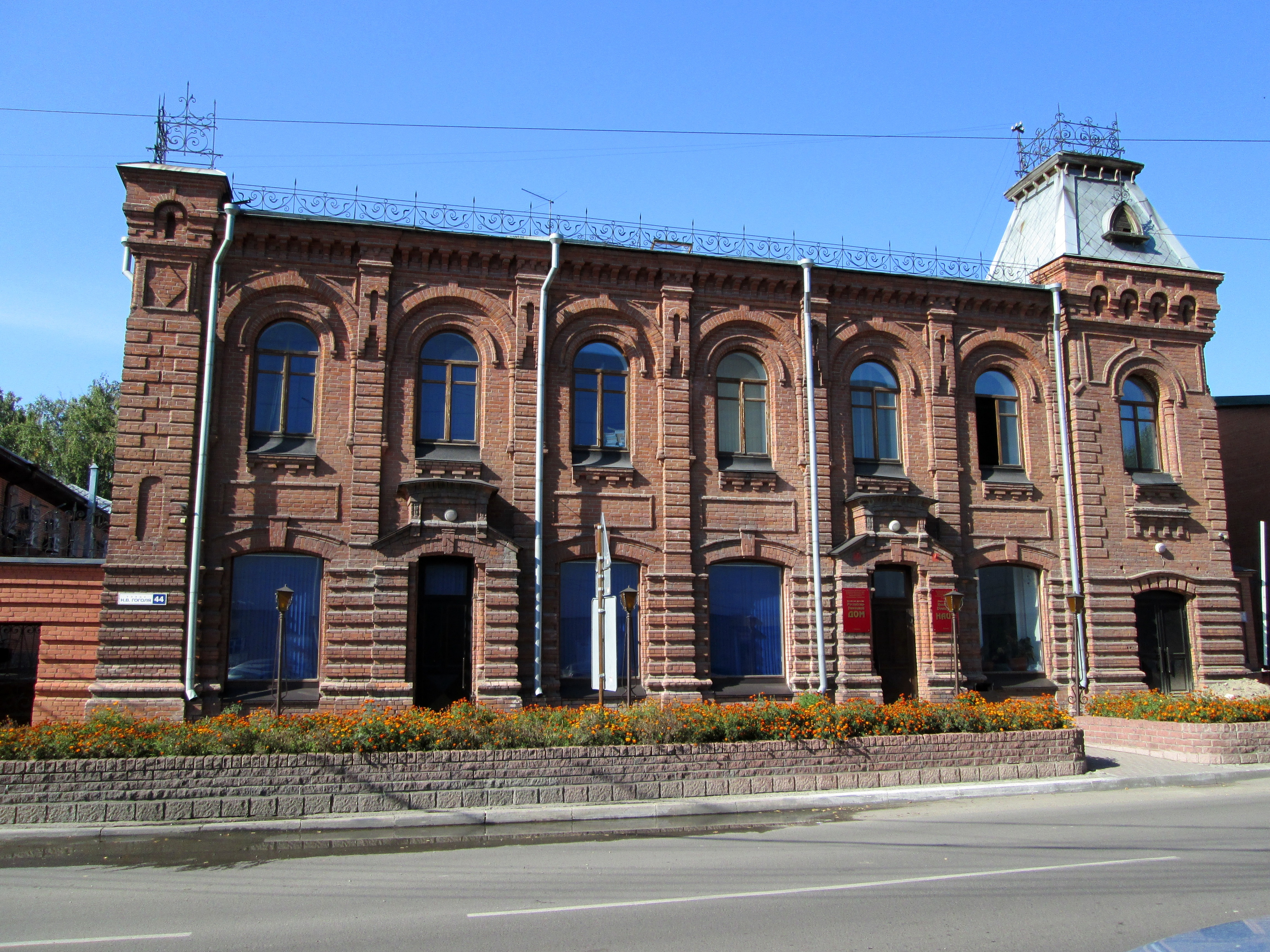 Дом Полякова: улица Гоголя, 44, Барнаул, Алтайский край